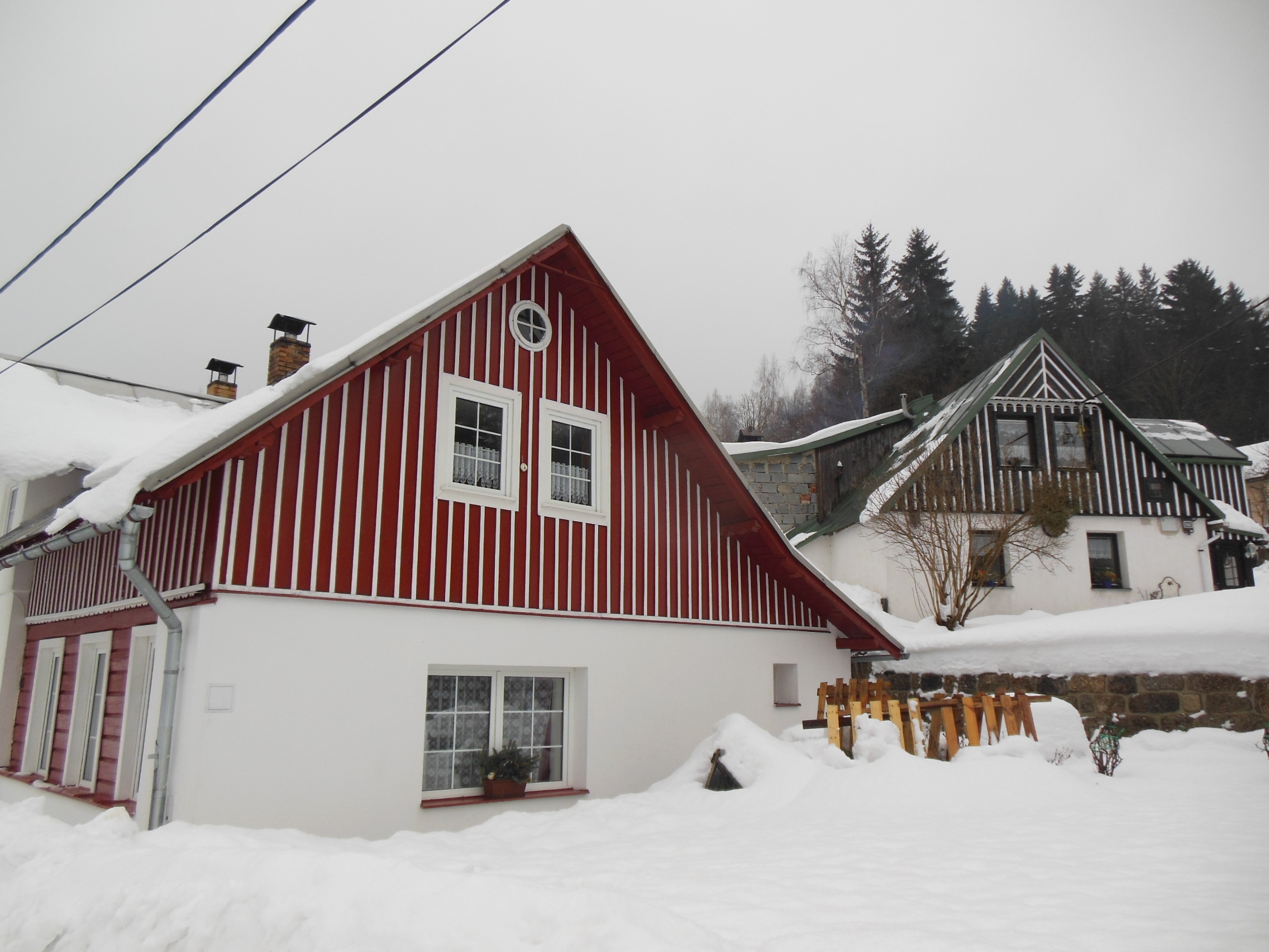 Domy č. p. 154 (vpředu) a 153 (v pozadí) v Josefově Dole-Dolním Maxově (okres Jablonec nad Nisou).